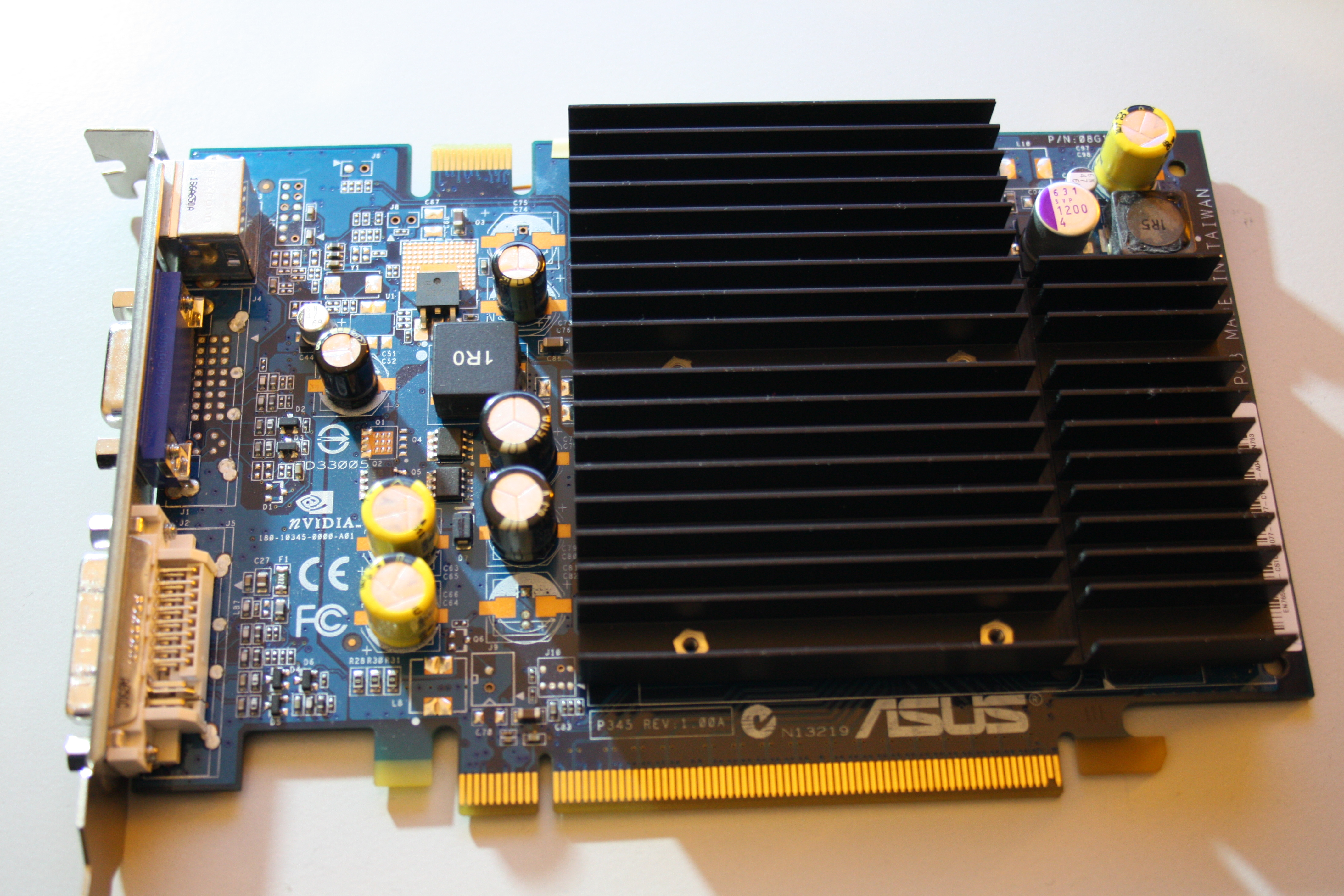 Meine ASUS Geforce 7650GS, welche ich mit einem Voltmod ausgestattet habe.